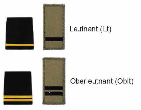 Schweizer Armee - Gradabzeichen Subalternoffiziere